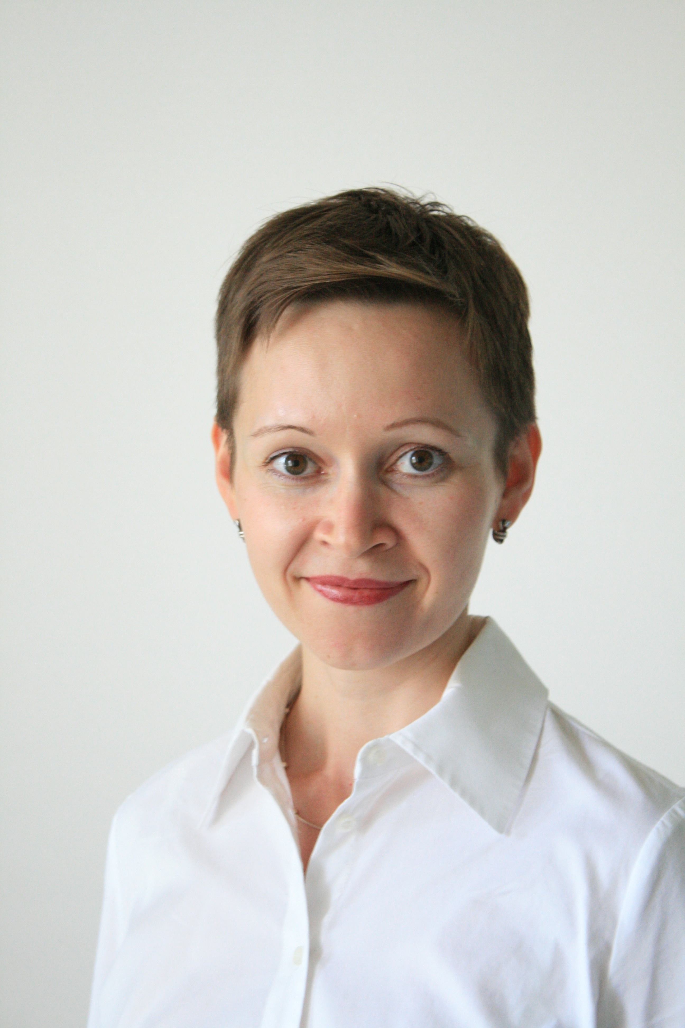 Гузель Яхина, 10.12. 2015 года.